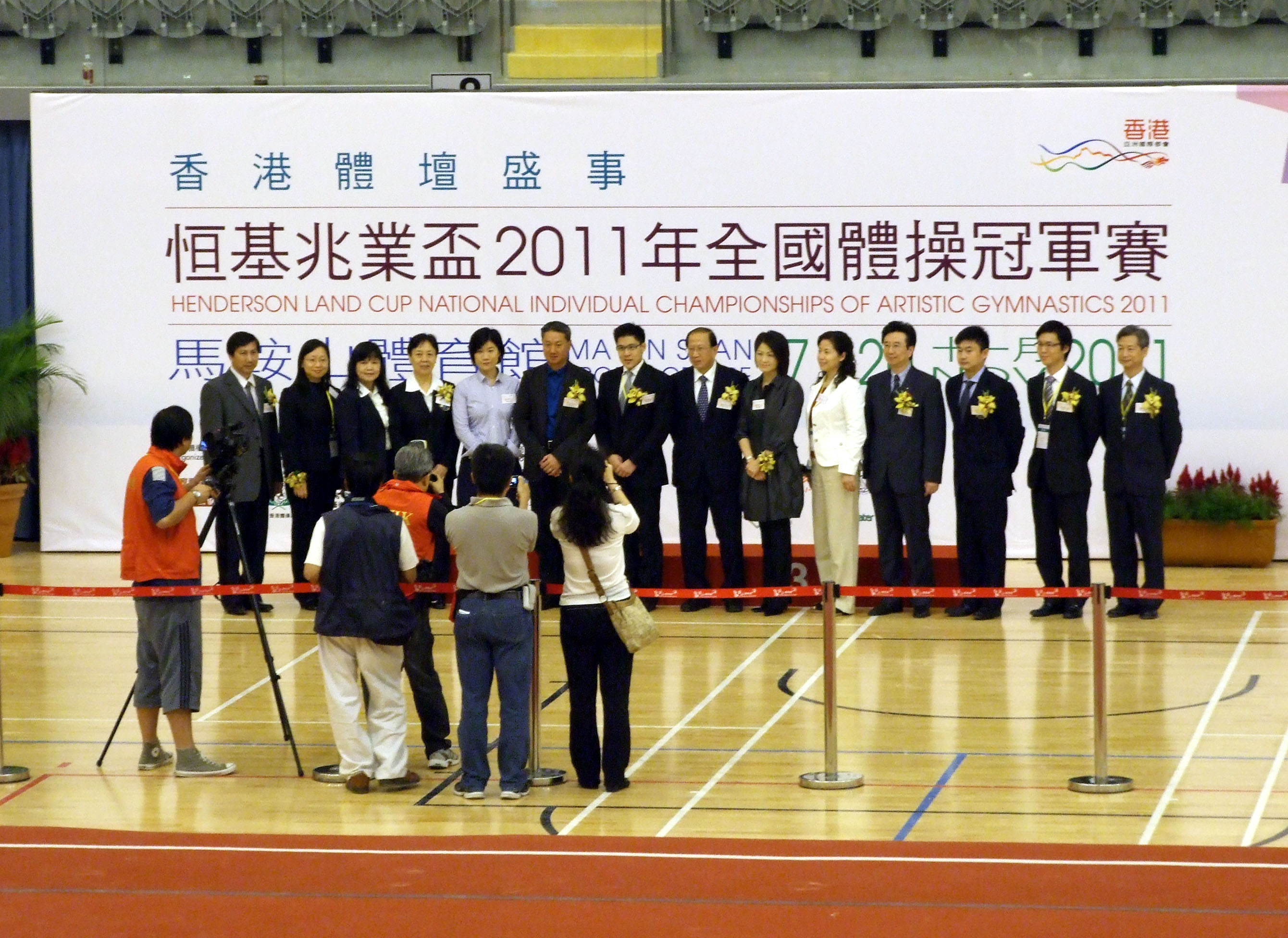 中文（香港）: 恒基兆業盃2011年全國體操冠軍賽組委會成員與首日決賽頒獎嘉賓